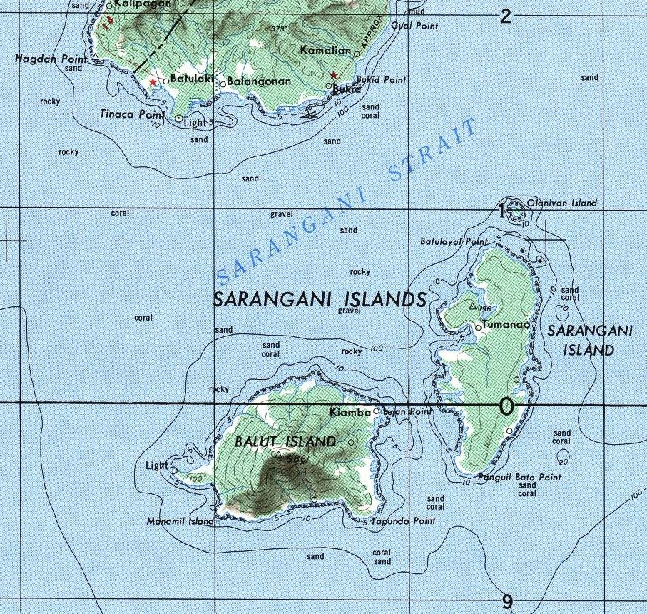 fragmento hoja NB 51-12 Caburan que comprende las islas de Sansangani Philippines 1:250,000 Series S501, U.S. Army Map Service, 1954